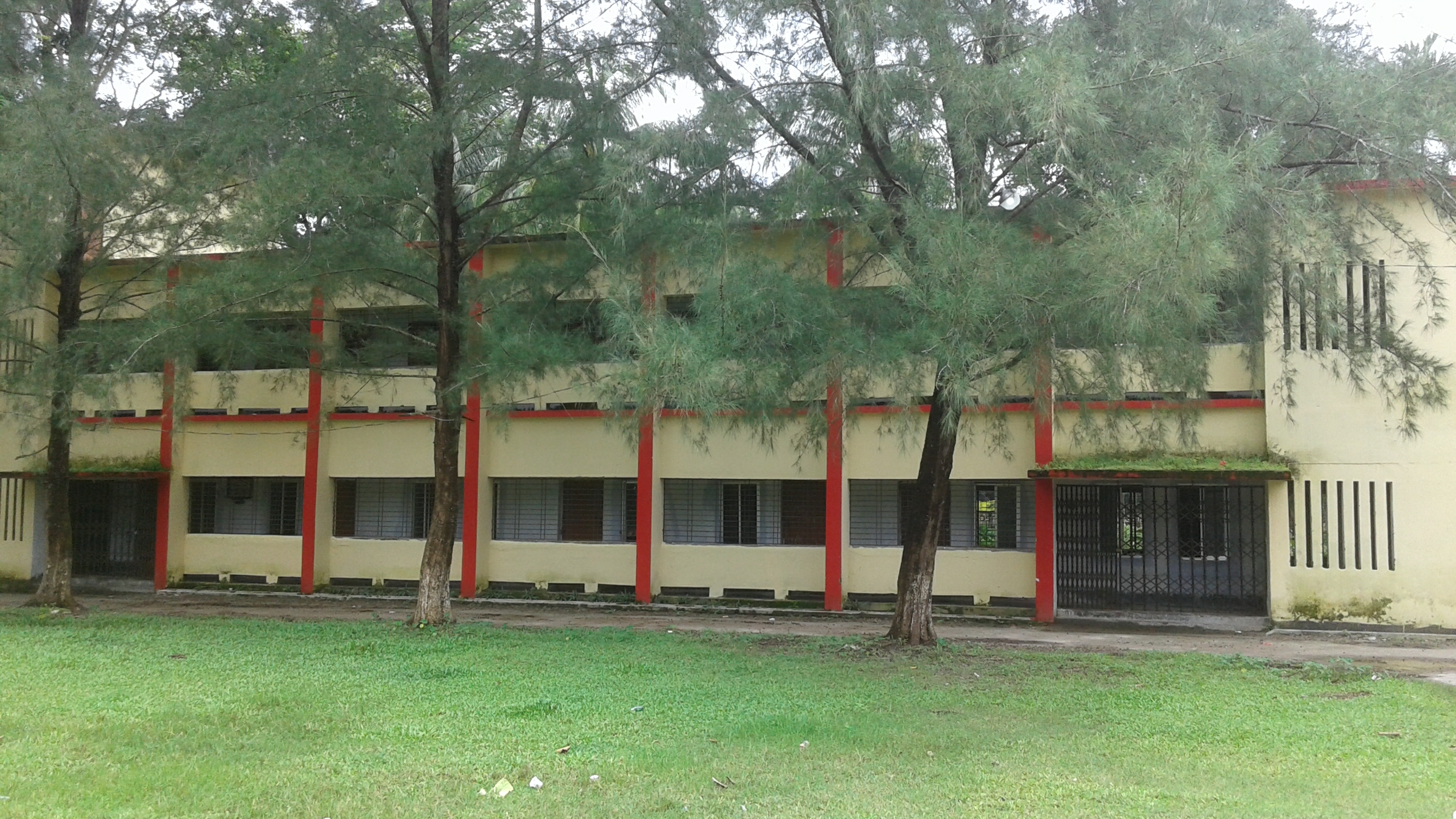 চরফ্যাসন সরকারি কলেজ, বিজ্ঞান ভবন